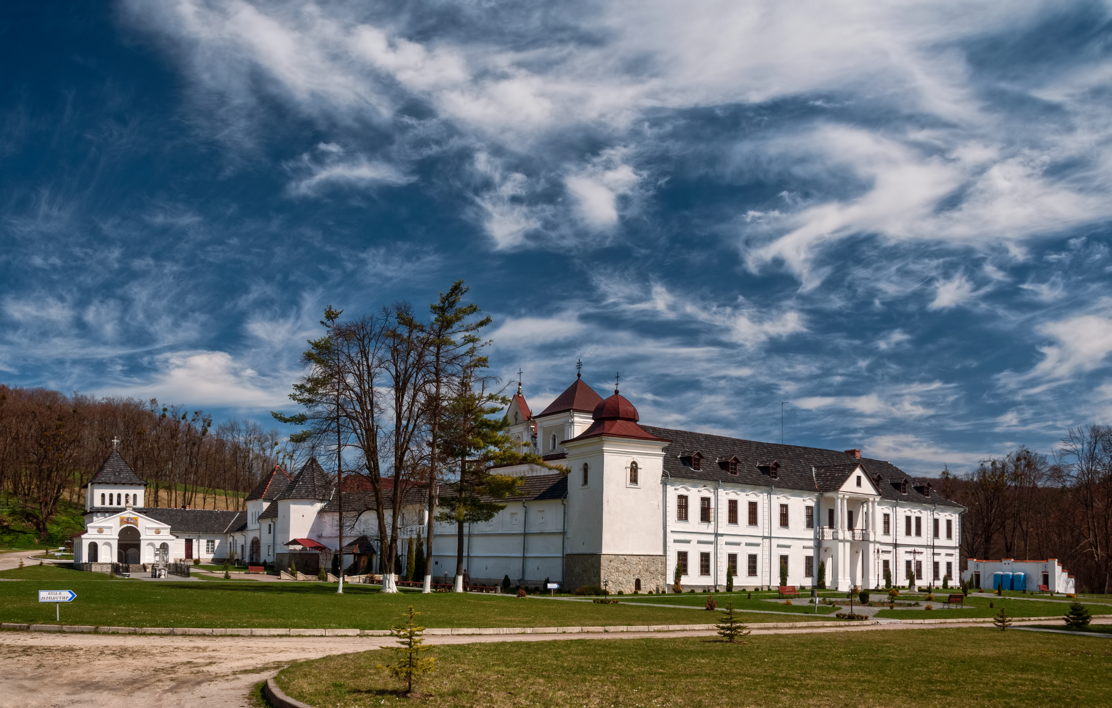 Унівський монастир-фортеця, Унів (Міжгір'я), на північ від села